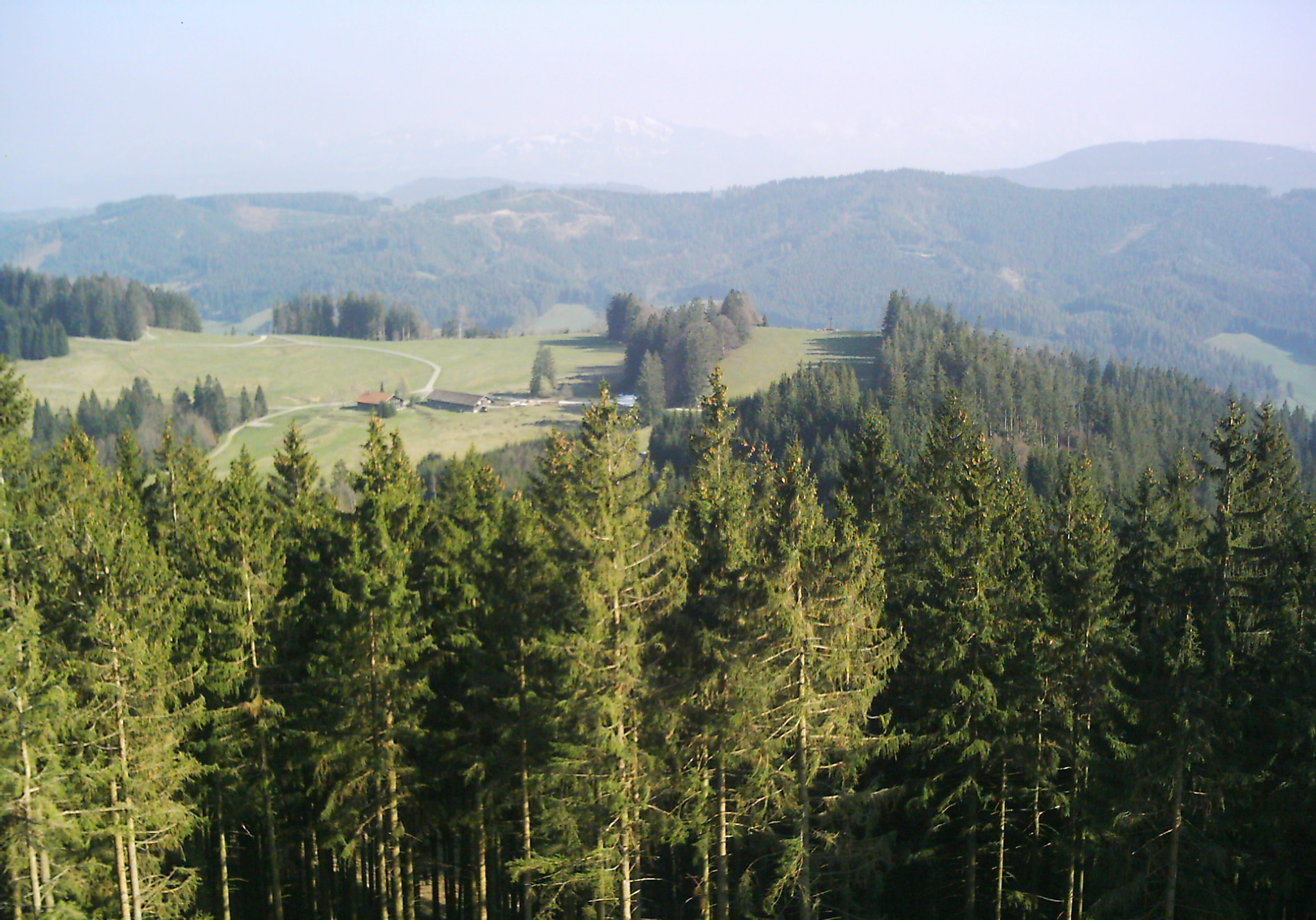 Raggenhorn vom Schwarzen Grat aus fotographiert. Gebäude Wengener Egg Alpe, rechts davon das Raggenhorn mit Gipfelkreuz